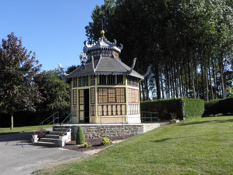 Chapelle Sainte-Anne à La Selle-Guerchaise (35).